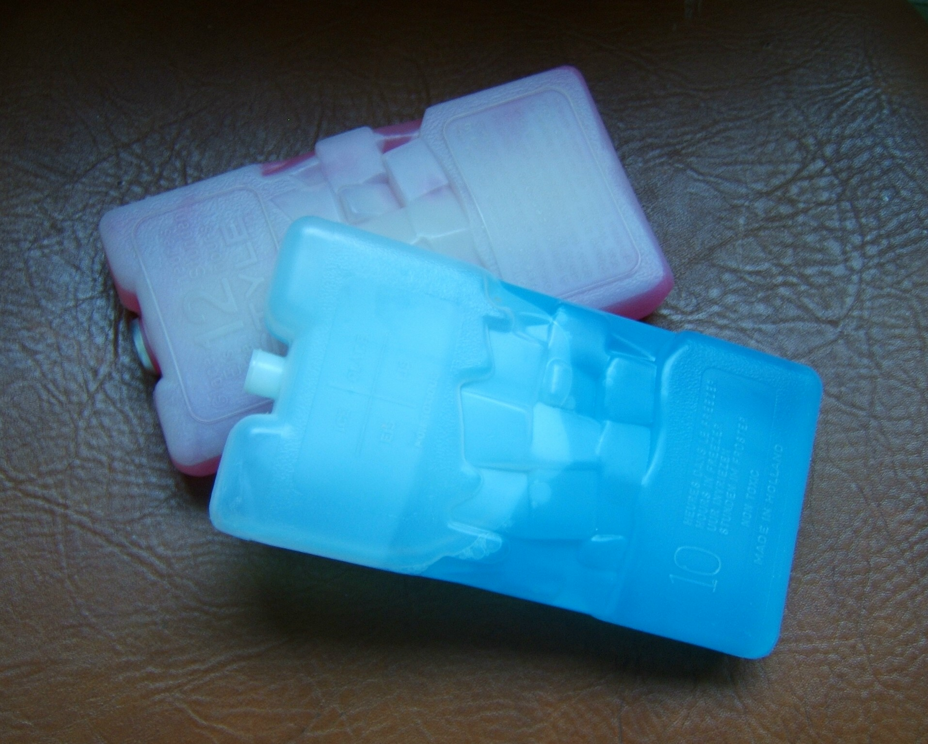 koelelementen